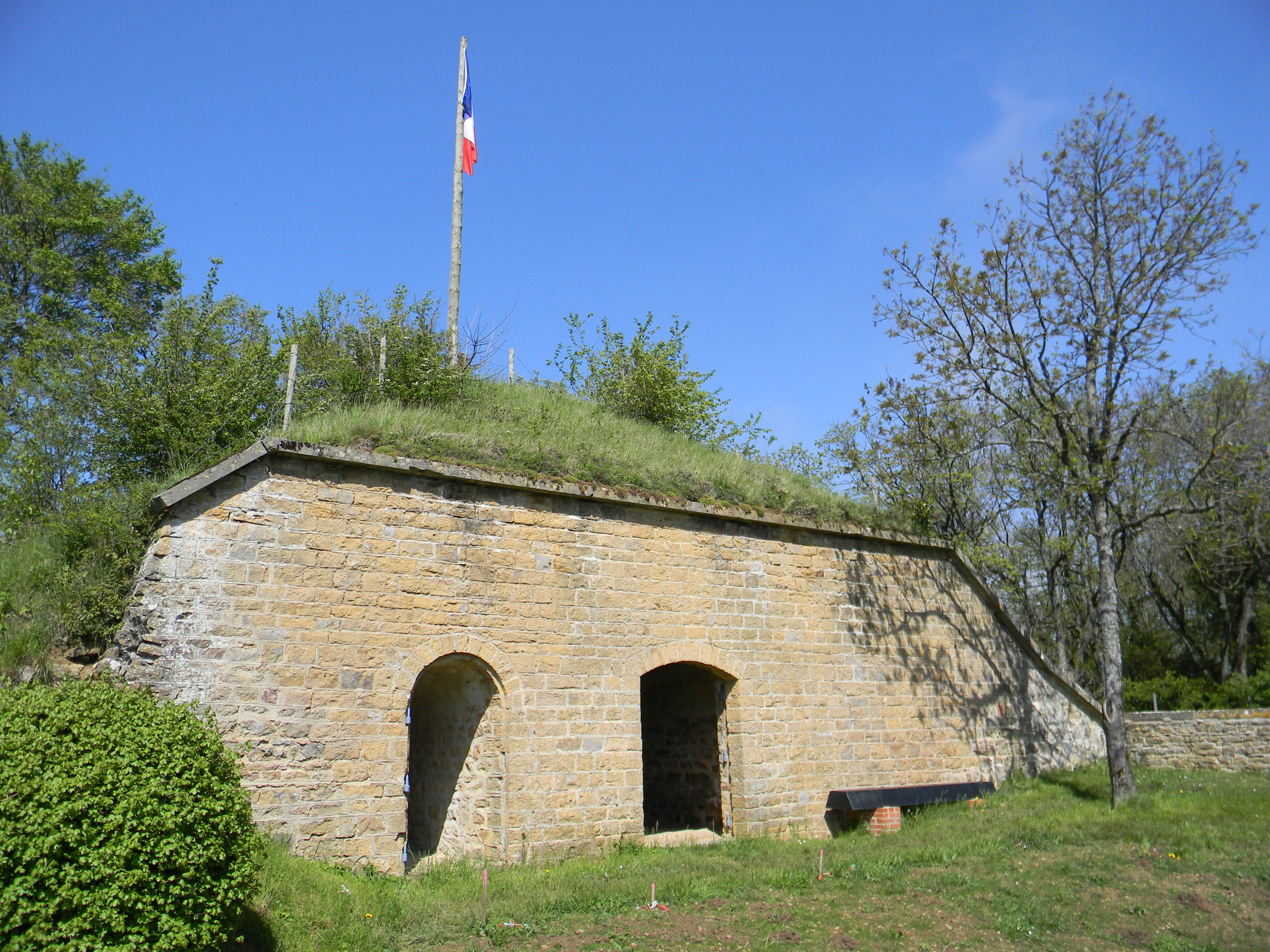 Un traverse-abris de la batterie des Carrières. L'entrée se fait sur la porte de droite, celle de gauche étant donnant sur une petite réserve.